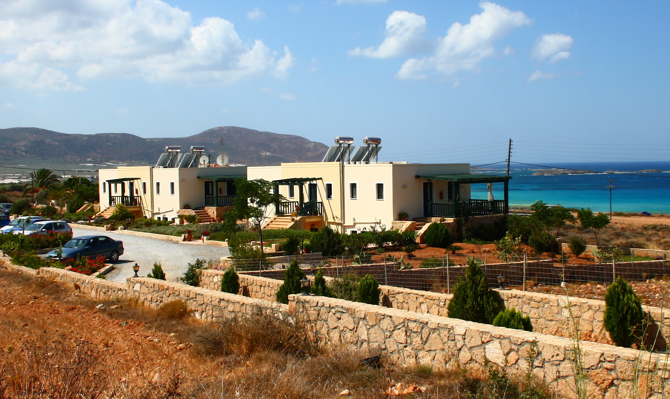 Magnolia Apartments in Falasarna